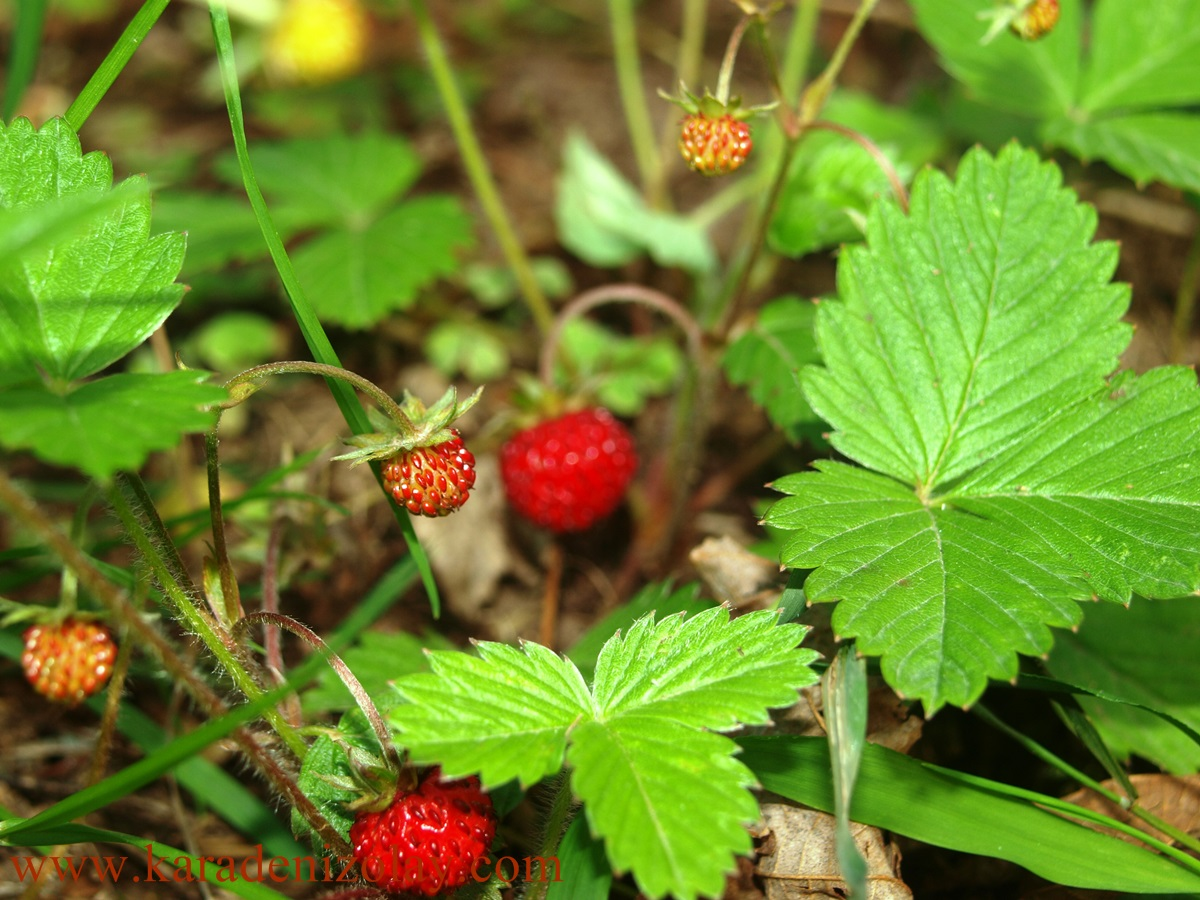 Hanifta cennet meyvesi, dağ çileği yaban çileği